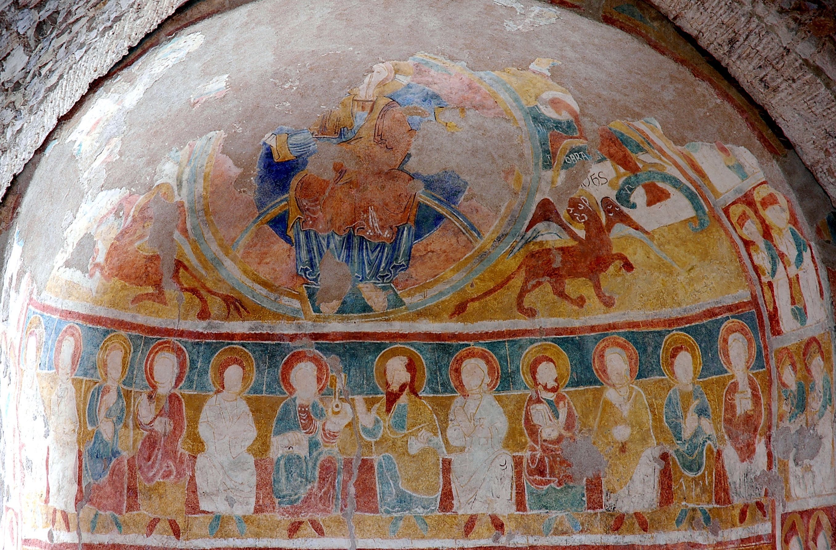 Sant Pau de Fontclara - Pintures absis